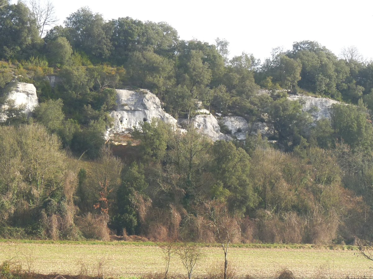 Rochers de la vallée des Eaux-Claires, Puymoyen